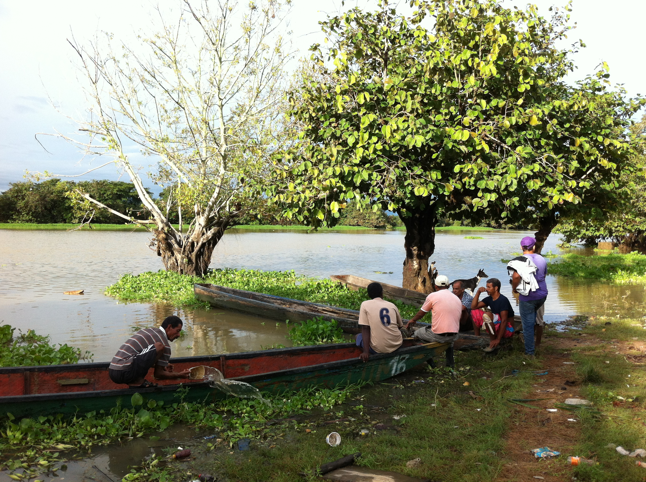 Barranca Lebrija